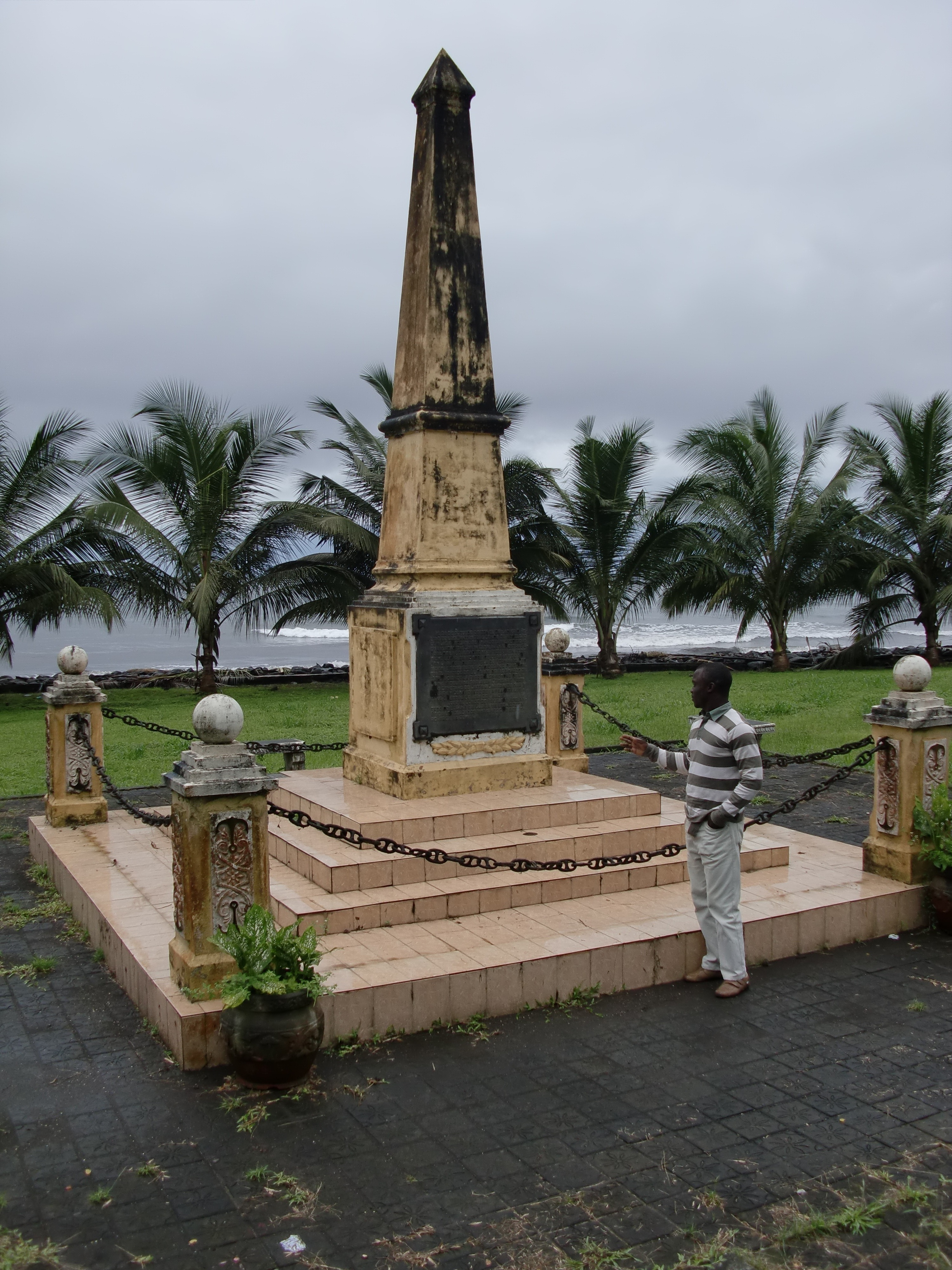 Fotografie vom Denkmal der ersten Einwanderer (1778) bei Luba, Bioko